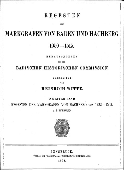 Titelblatt des zweiten Bandes der Regesten der Markgrafen von Baden und Hachberg 1050–1515. Badische Historische Kommission (Hrsg.), Verlag der Wagnerschen Universitäts-Buchhandlung, Innsbruck 1901